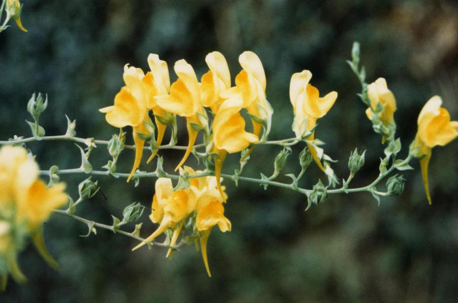 Linaria genistifolia subsp. dalmatica